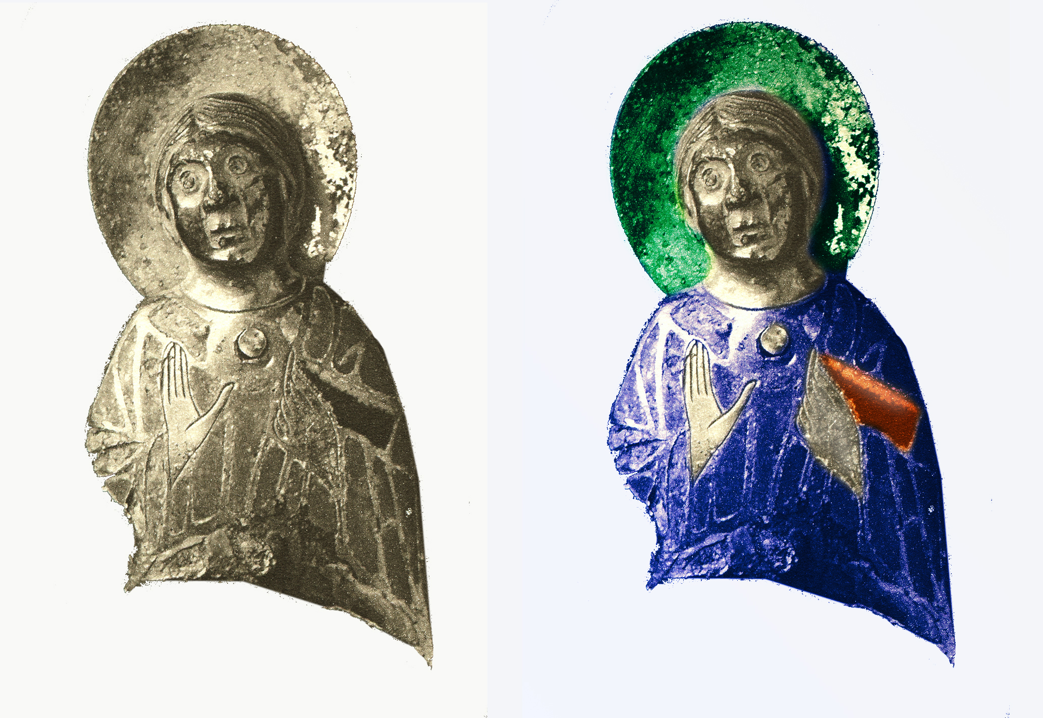 trésor de Cherves : partie de croix de procession Saint Jean en émail champlevé